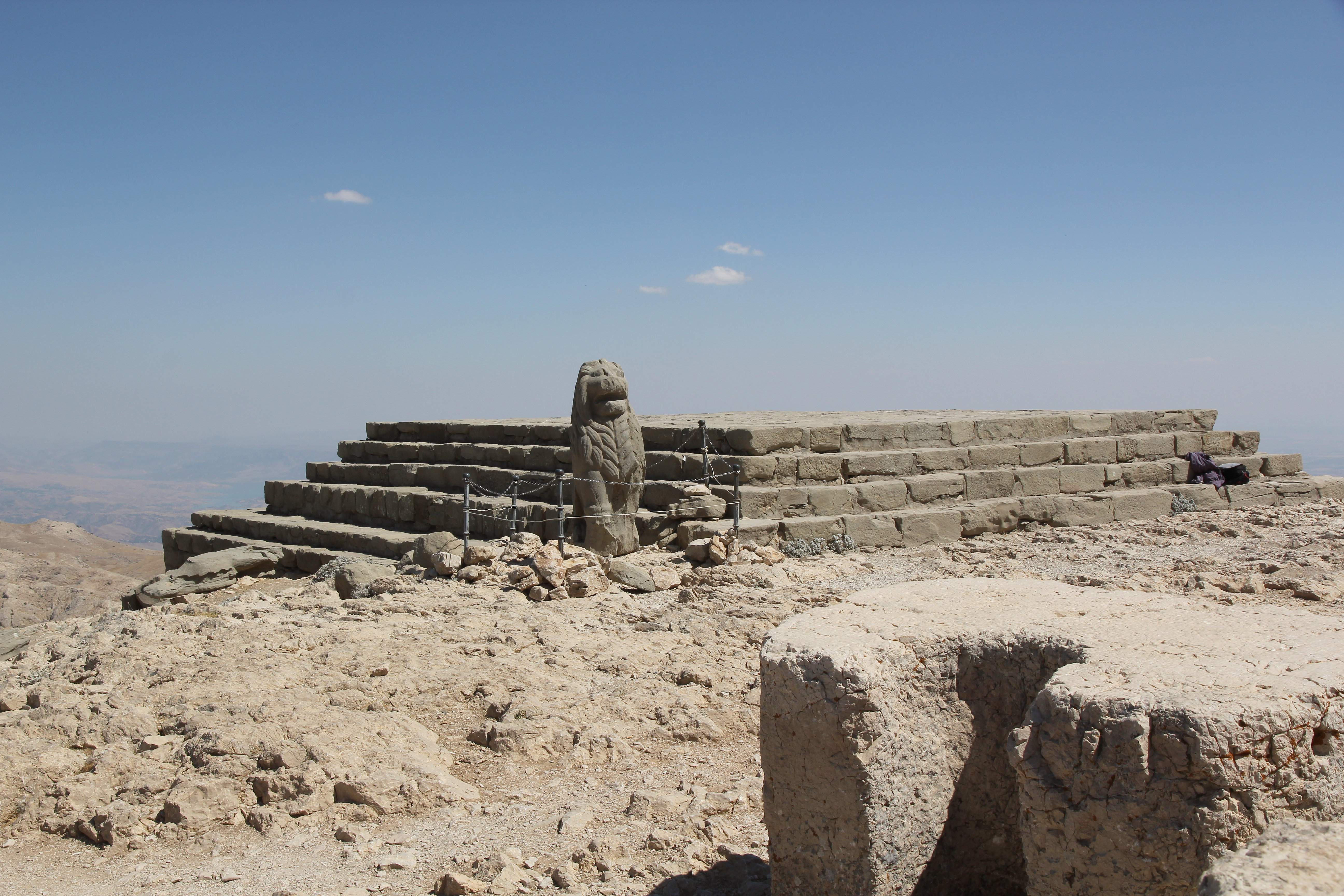 Altar und Wächterlöwe am Ende des Prozessionswegs, Nemrut Dağı, Südosttürkei, Ostterrasse